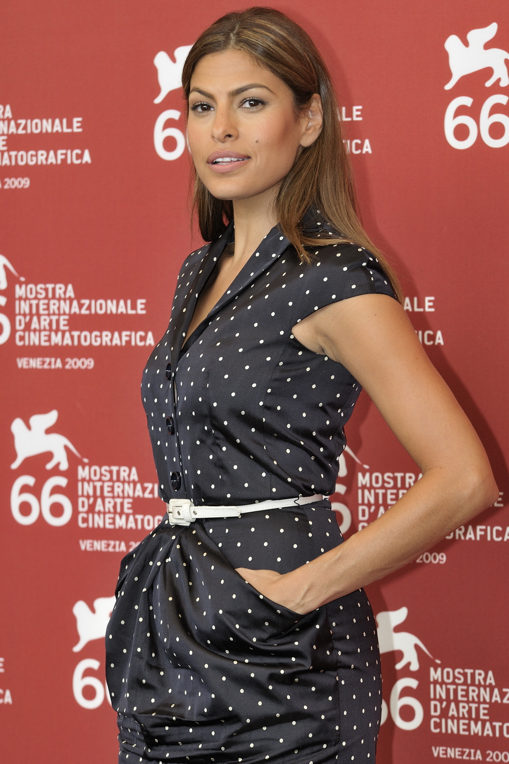 66ème Festival du Cinéma de Venise (Mostra), 3ème jour (04/09/2009) Photocall avec Nicolas Cage, Eva Mendes et le réalisateur Werner Herzog pour le film : Bad Lieutenant : Port of Call New Orleans